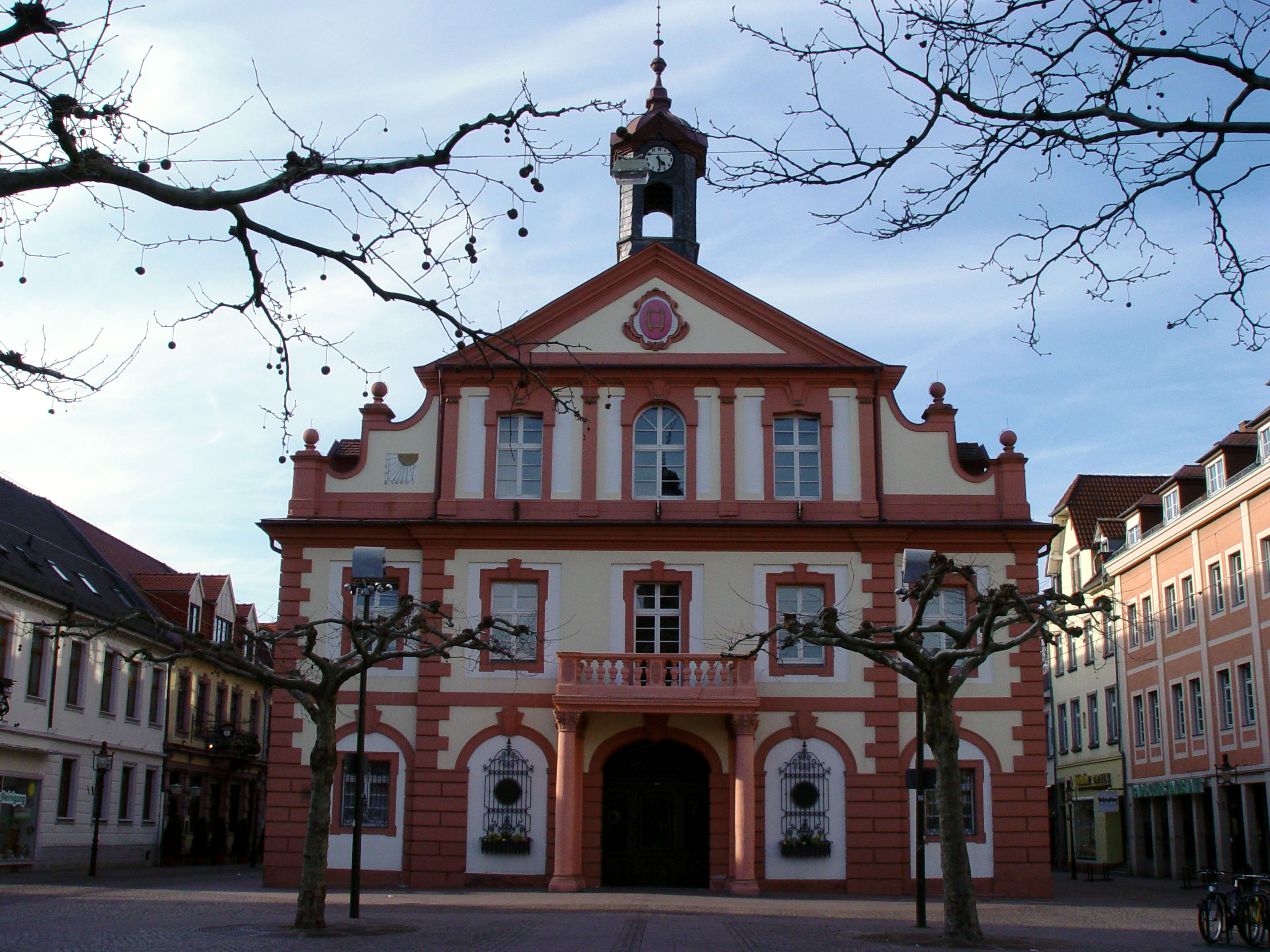 Fotografiert von Martin Dürrschnabel. Rastatter Rathaus.